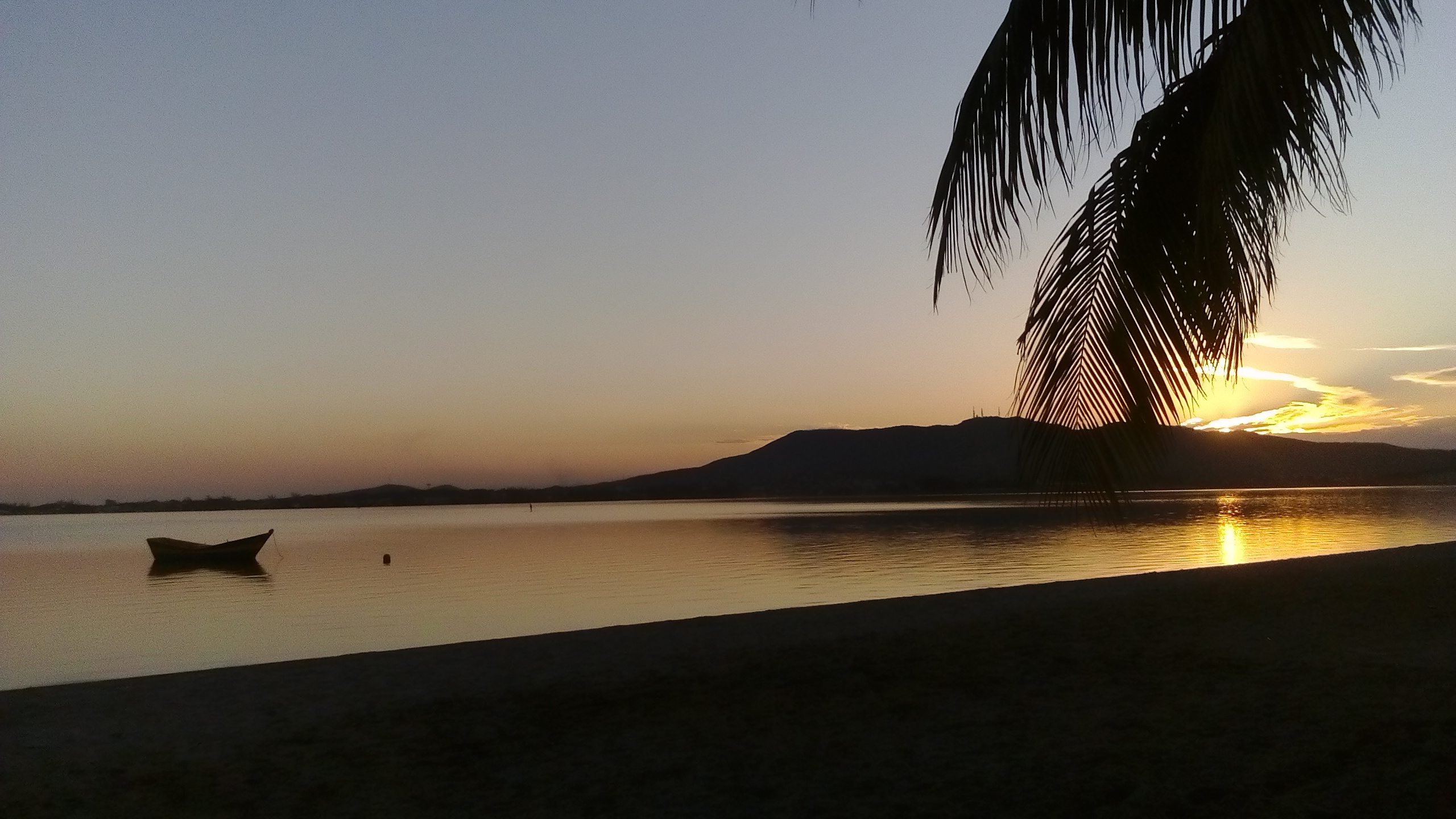 Pôr do sol na Lagoa de Araruama e de fundo a Serra de Sapiatiba(Parque Estadual da Costa do Sol) em São pedro da Aldeia - RJ